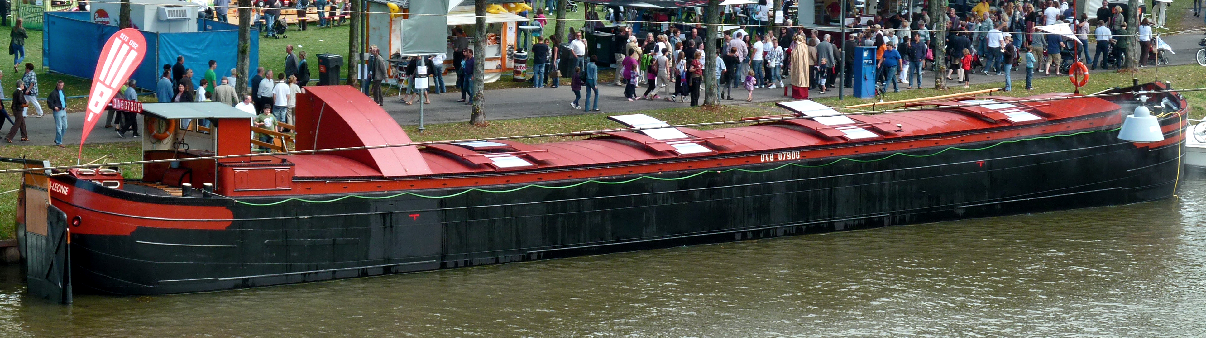 Das Treidelschiff "Anna-Leonie", das letzte seiner Art in Saarbrücken. Sie steht unter Denkmalschutz und ist für Besucher zugänglich.